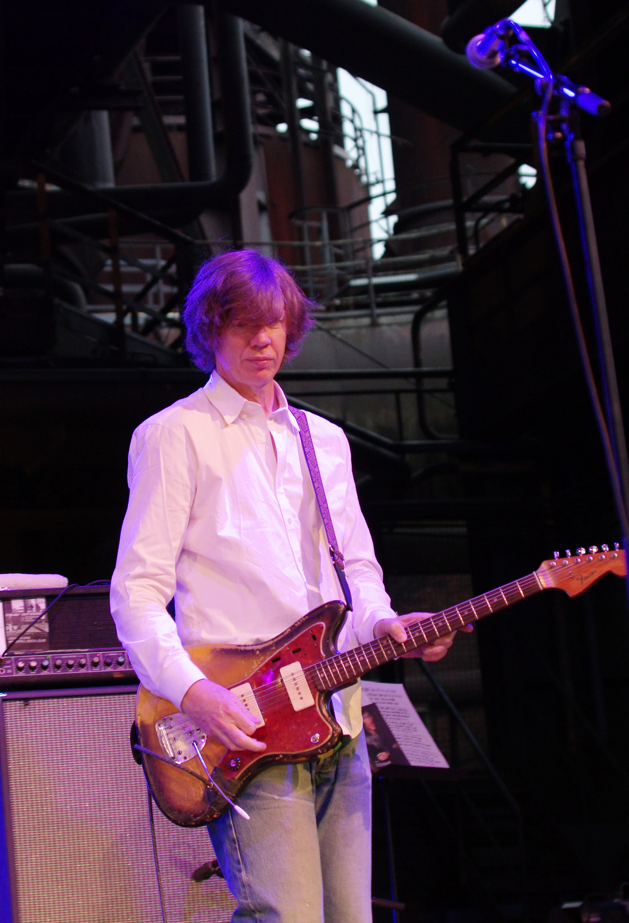 Chelsea Light Moving beim Traumzeit-Festival 2013 in Duisburg. Besetzung: Samara Lubelski (bass), John Moloney (dr), Thurston Moore (voc, git), Keith Wood (git)